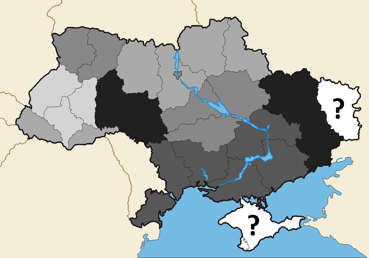 Відсоток атеїстів у регіонах України. Опитування фонду "Демократичні ініціативи" ім. І. Кучеріва. 2015 рік. Що темніший колір, то більша частка атеїстів. Опитування не проводили в АР Крим, Севастополі та Луганській області (